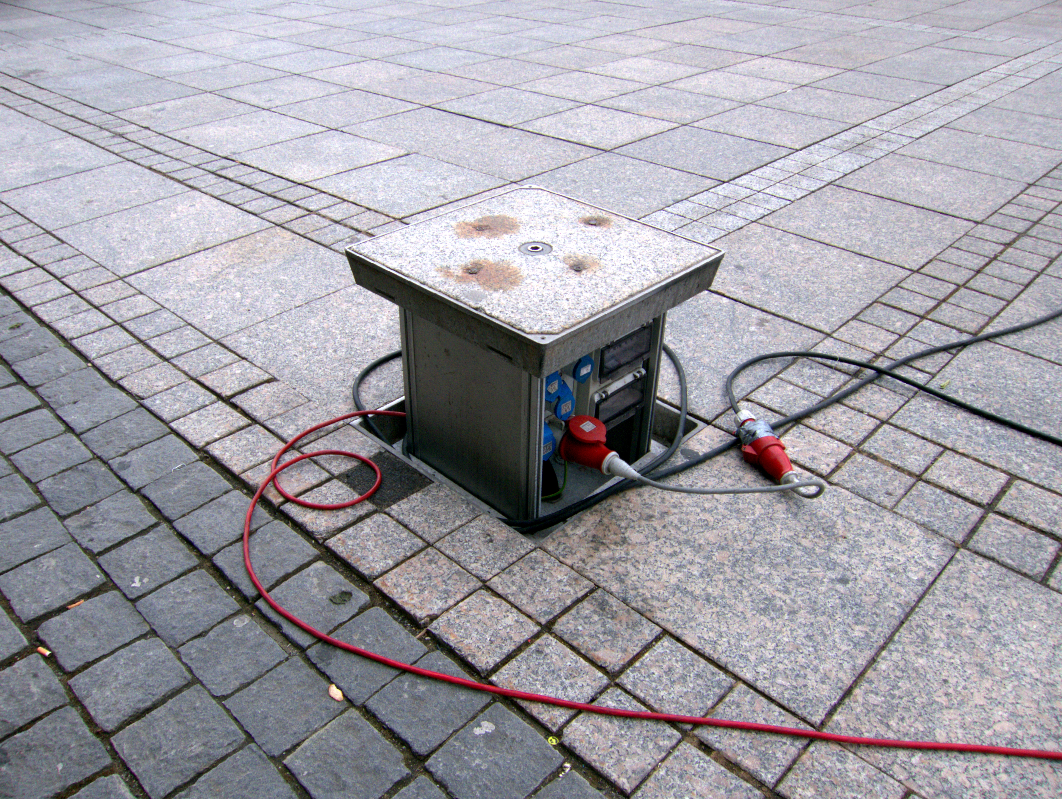 Ein Senkelektrant vor dem Westportal des Ulmer Münster. Der Münsterplatz dient auch der Durchführung von Wochenmärkten. Zur Versorgung mit Strom werden diese Senkelektranten eingesetzt.